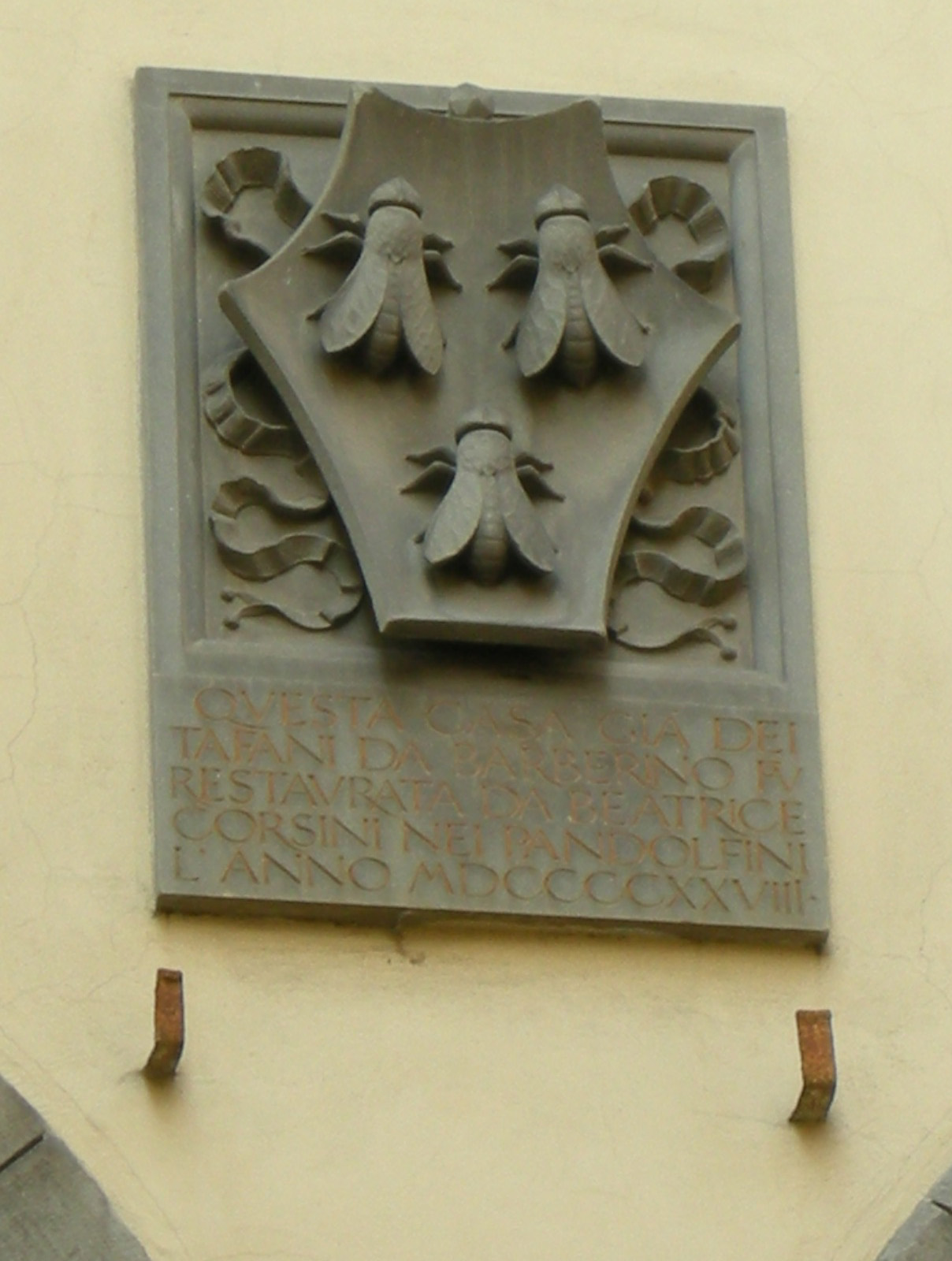 Palazzo Tafani da Barberino, stemma barberini